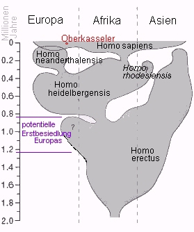 Stammbaum-Modell in Anlehnung an G. P. Rightmire: Human evolution in the Middle Pleistocene: the role of the Homo heidelbergensis, 1998 mit Ergänzungen und Änderungen des Modells nach: W. Henke/ R.W. Schmitz/ M. Street: Die späteiszeitlichen Funde von Bonn-Oberkassel, in: Rheinisches Landesmuseum: Roots - Wurzeln der Menschheit, 2006, S. 36 dazu Eintrag der Oberkasseler Menschen:eigene Zeichnung nach Vorlage